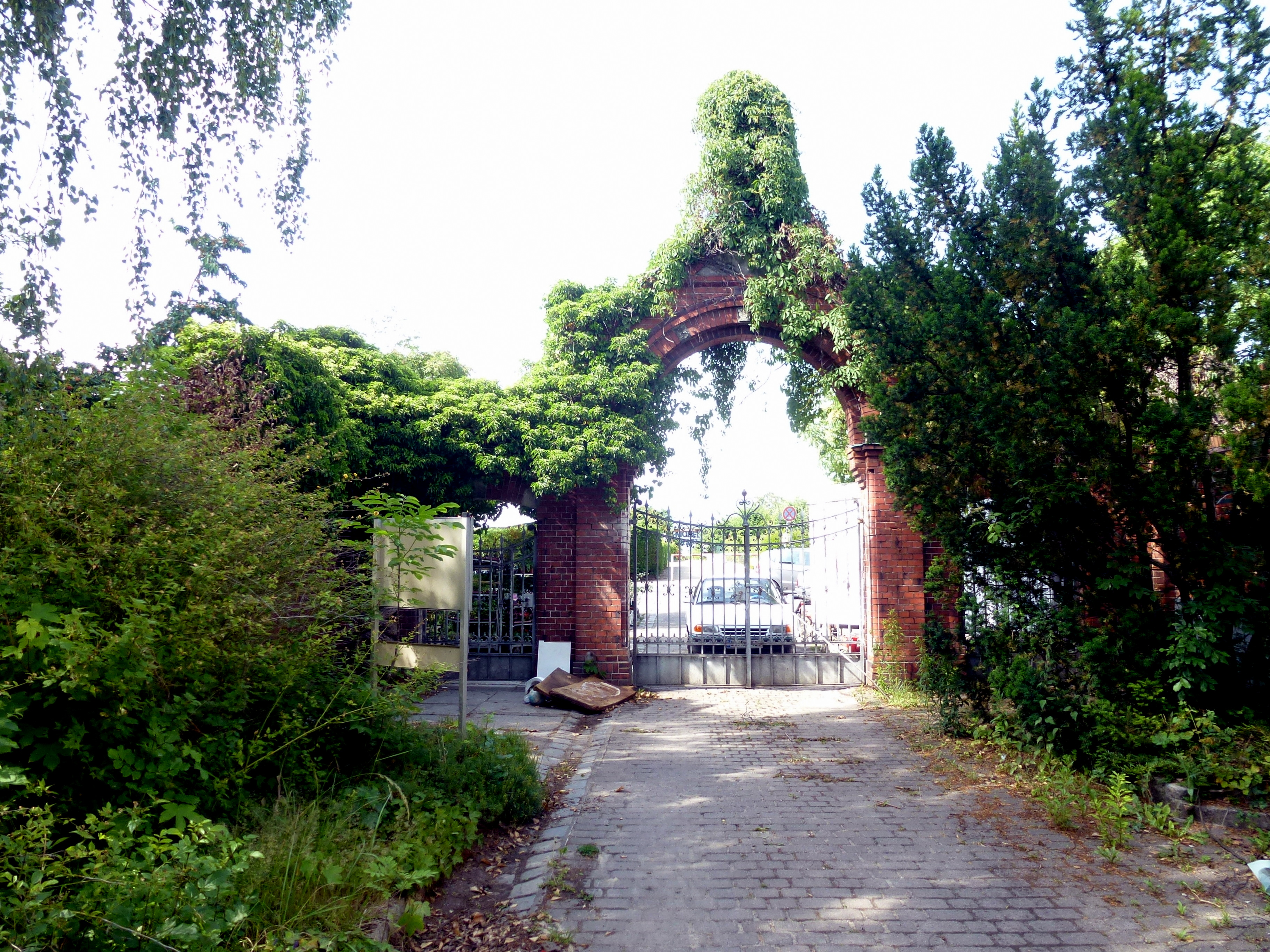 Friedhof Priesterweg Eingang